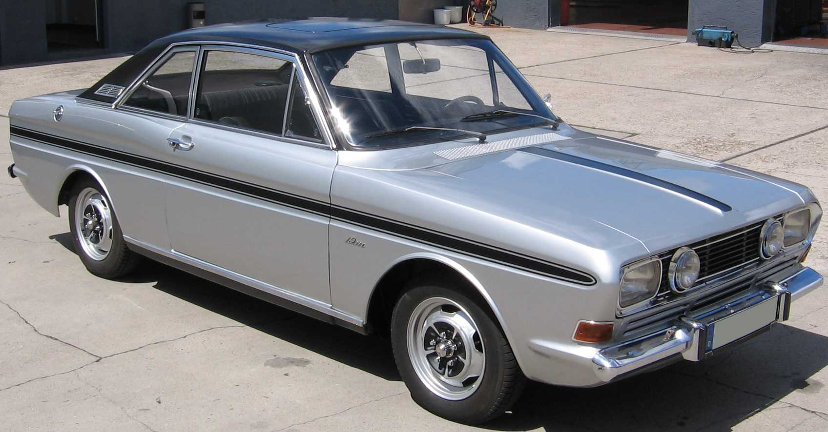 15m RS Coupé, 07/1969